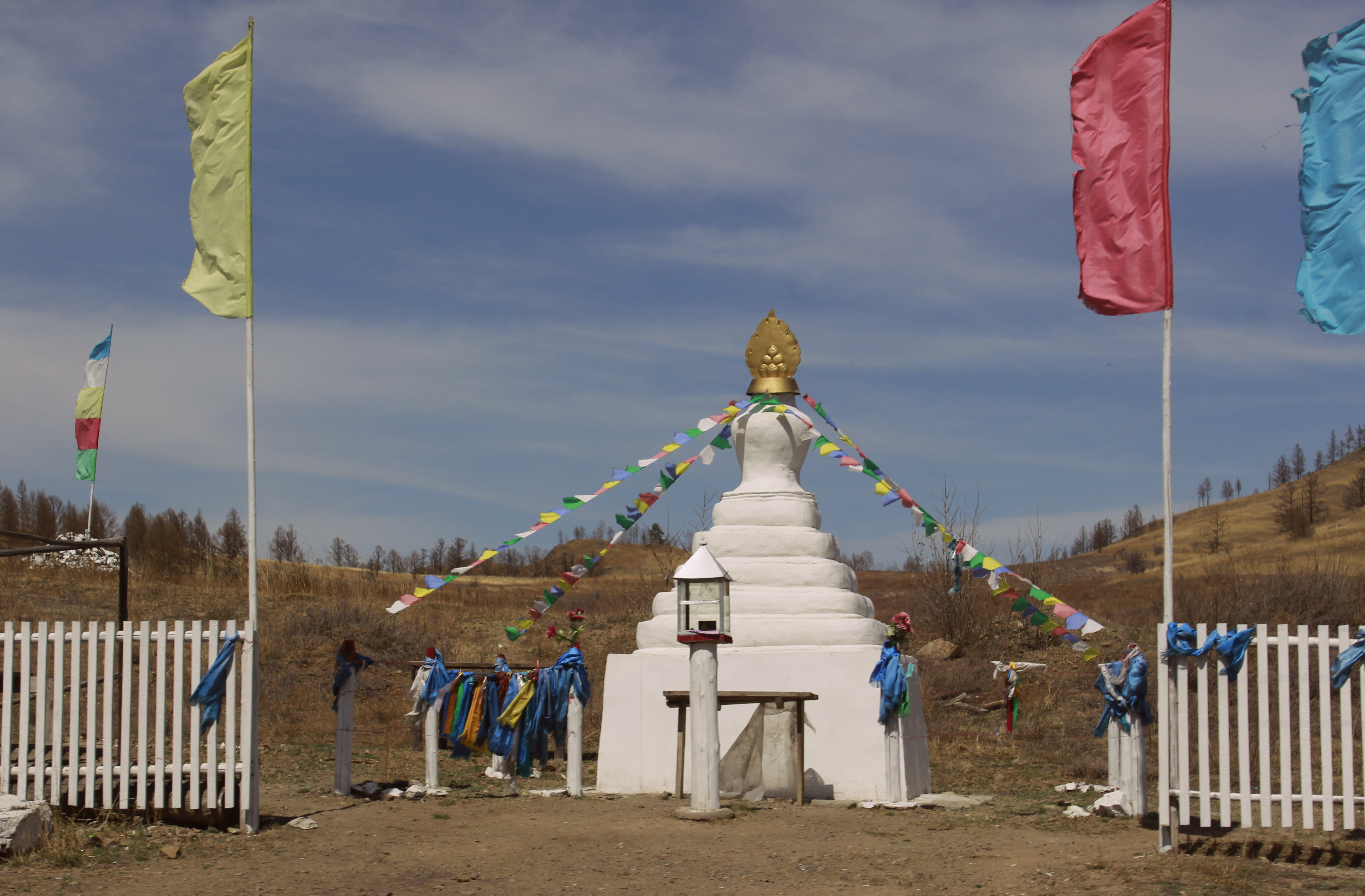 Ступа на горе Капитанка в окрестностях села Шартыкей. Бурятия, Джидинский район